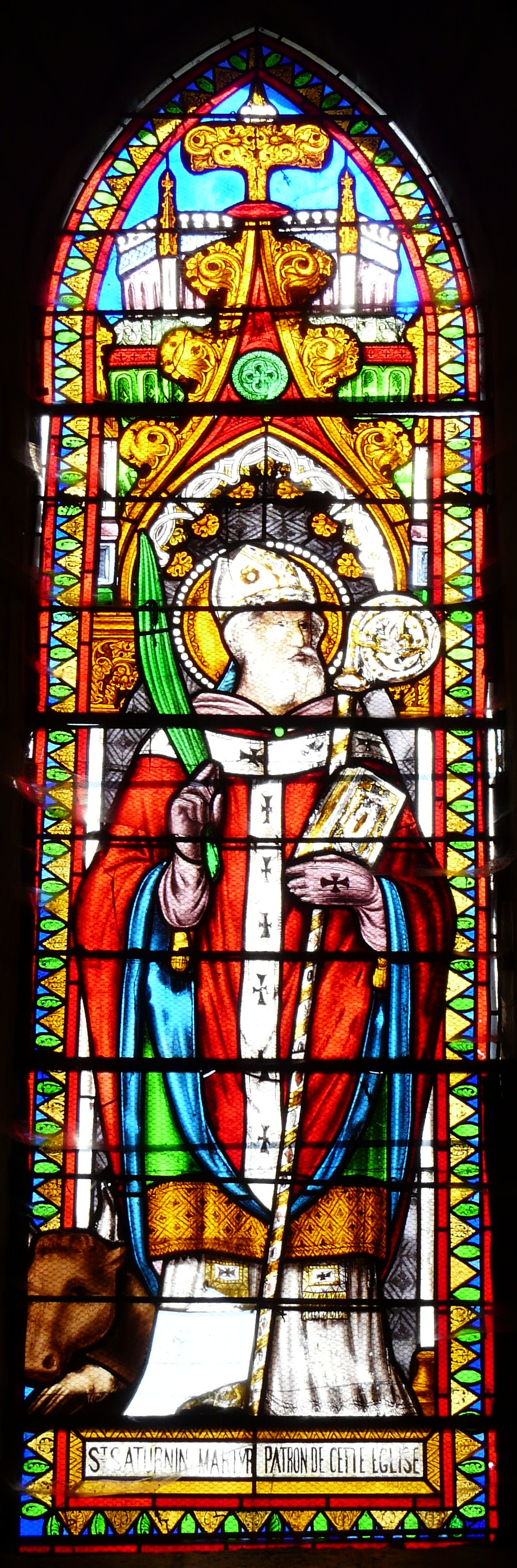 Vitrail du chœur représentant saint Saturnin, église Saint-Saturnin, Salon, Dordogne, France.